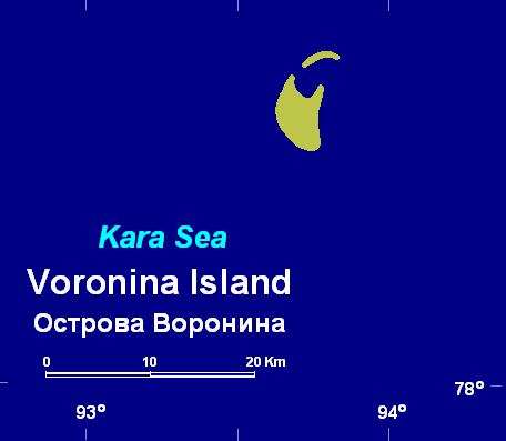 Востраў Вароніна.